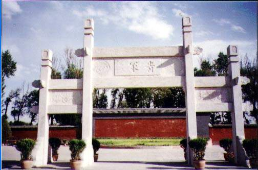 王昭君墓。zzjgbc摄于2001年。